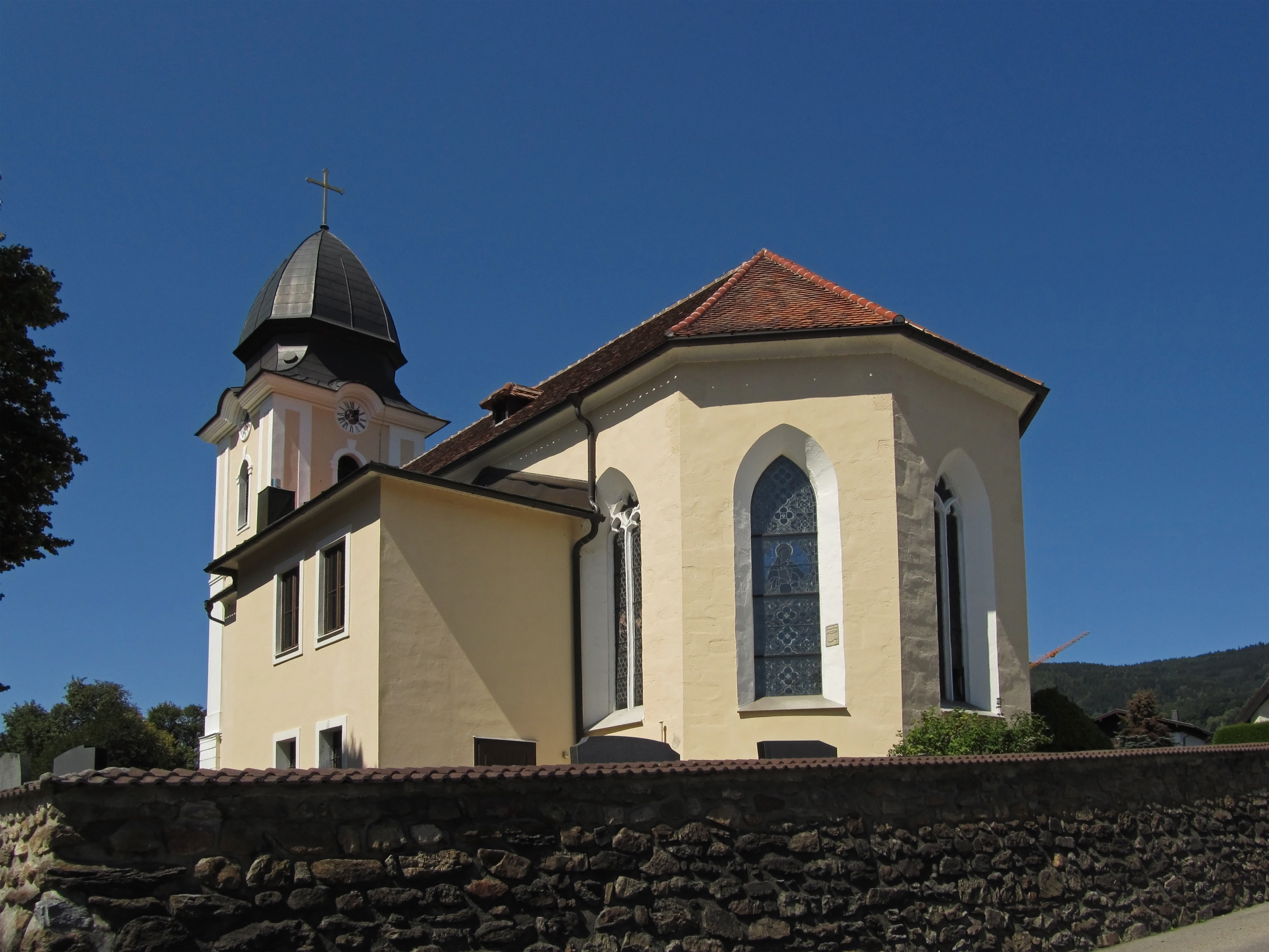 Kath. Pfarrkirche hl. Margarethe in Laimbach am Ostrong